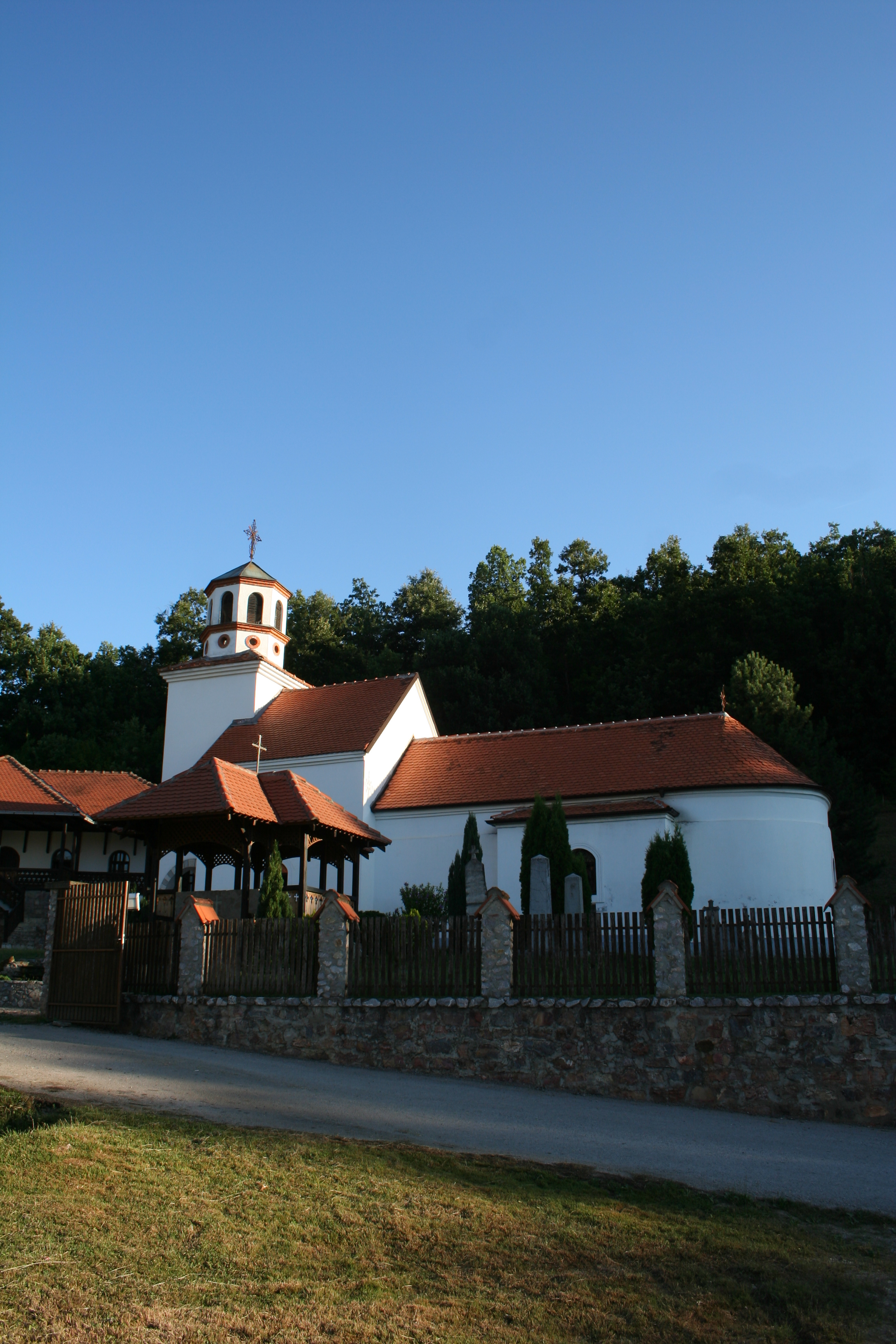 Crkva prenosa moštiju Sv. Nikolaja, Stepanje